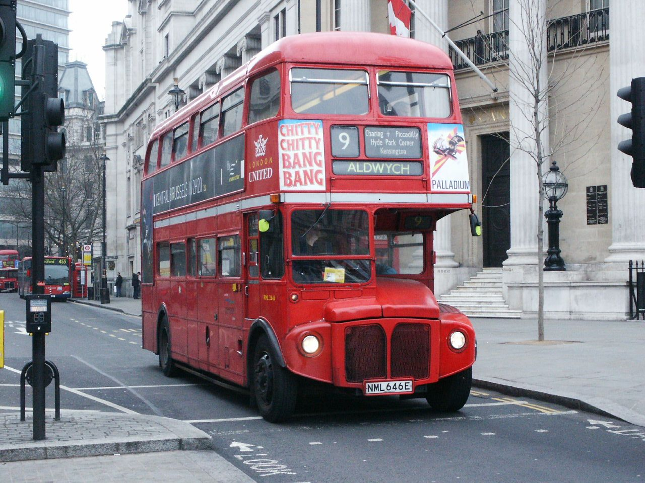 2646-NML646E 060304 cps